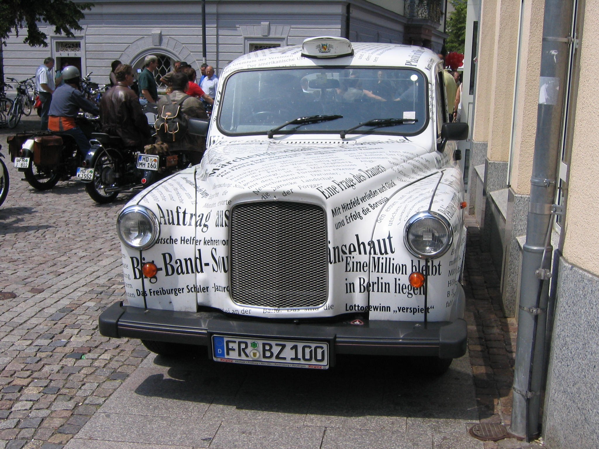 aufgenommen während eines Oldtimer-Treffens im Emmendingen, Deutschland